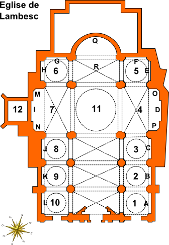 Plan de l'église Notre-Dame de l'Assomption réalisé avec Inkscape.